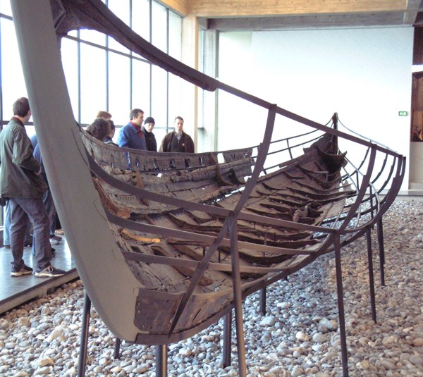 Skuldelev V: Ein wikingerzeitliches, kleineres Kriegsschiff, das im Roskilde-Fjord in der Nähe von Skuldelev gefunden wurde.